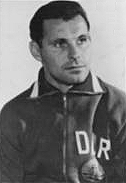 Werner Unger, Nationalspieler der DDR-Fußballnationalmanschaft im Jahre 1964.